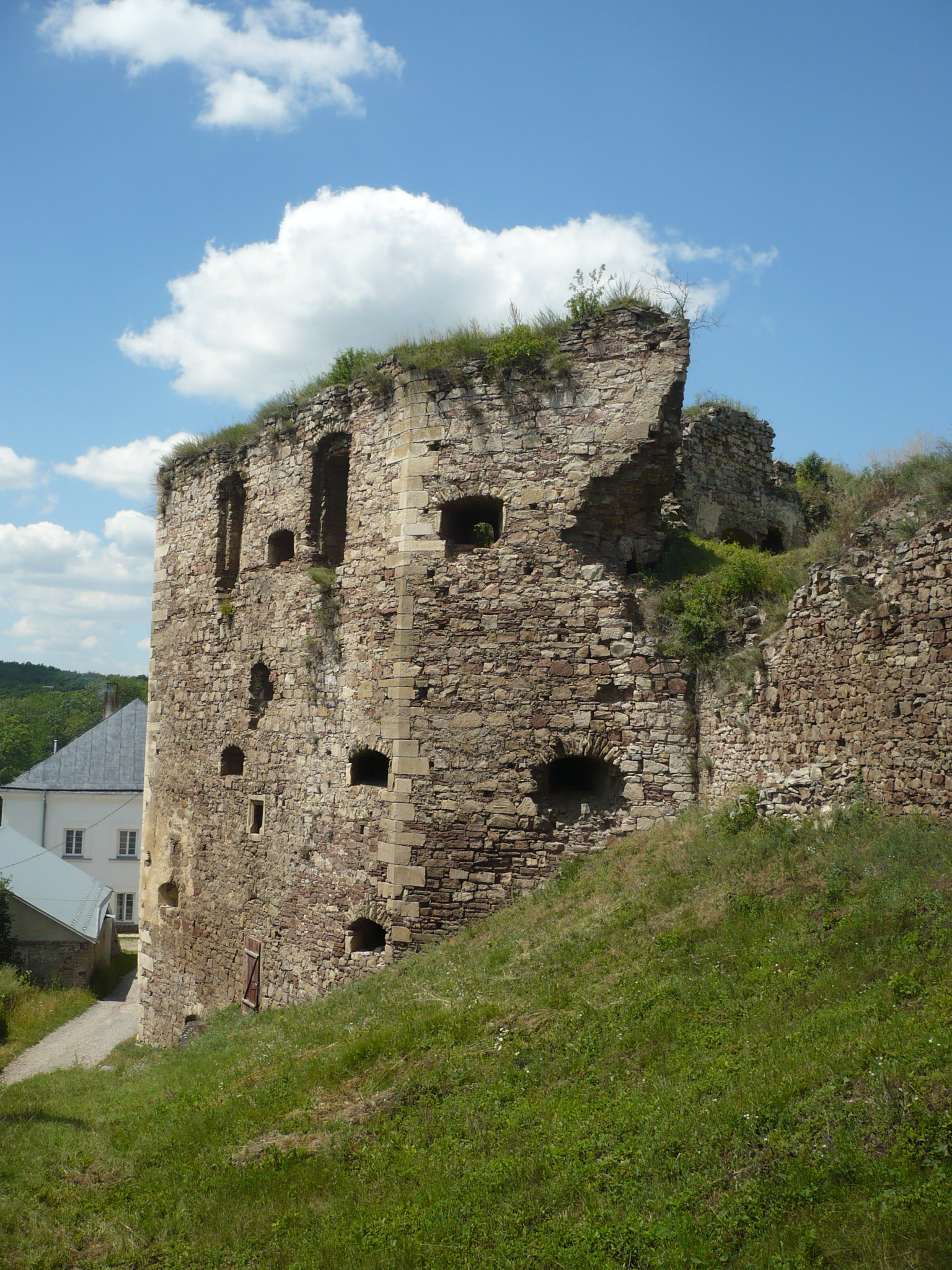 Jazłowiec. Zamek